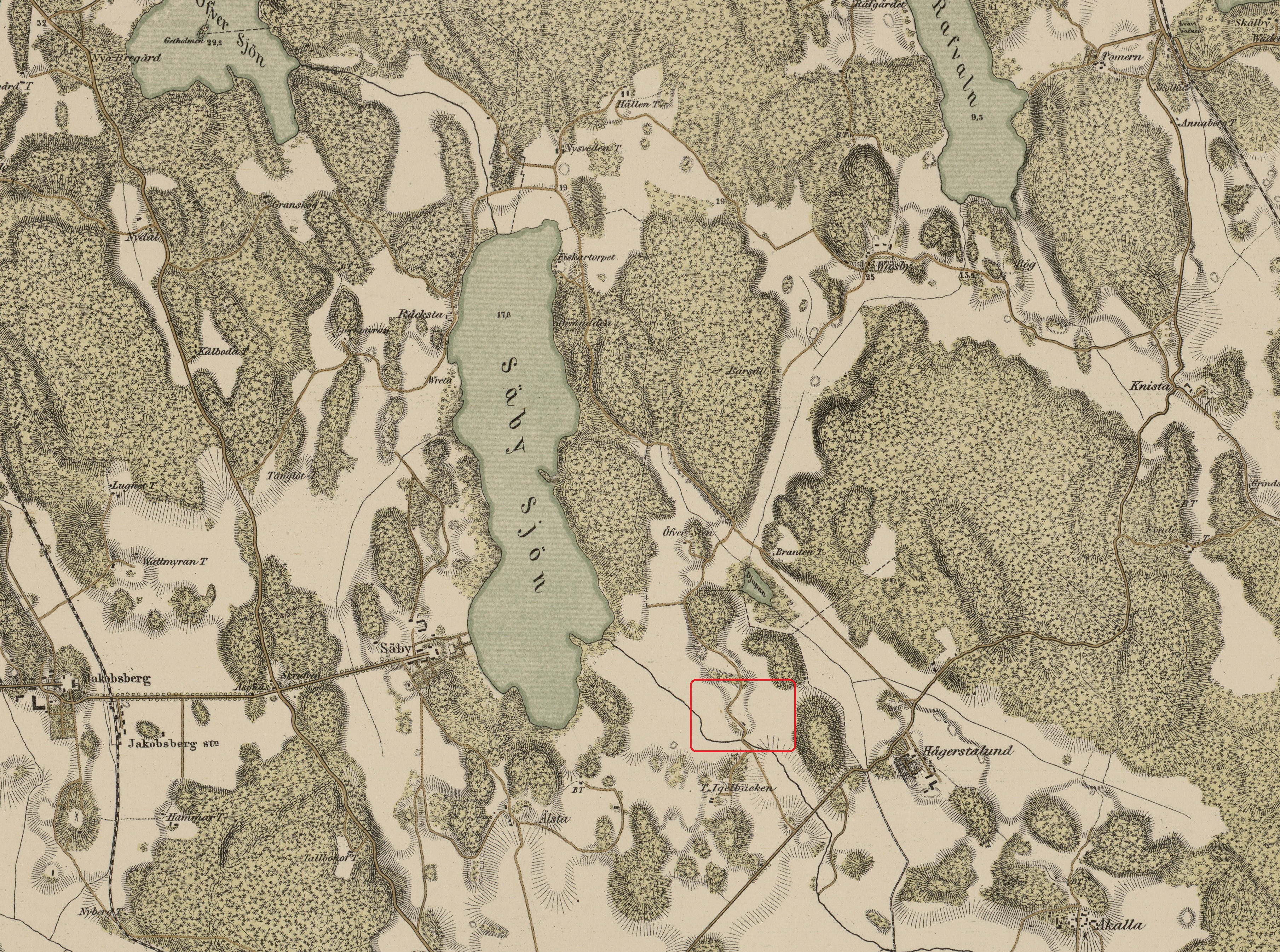 Säbysjön med läget för gårdarna Sten och Yttersten